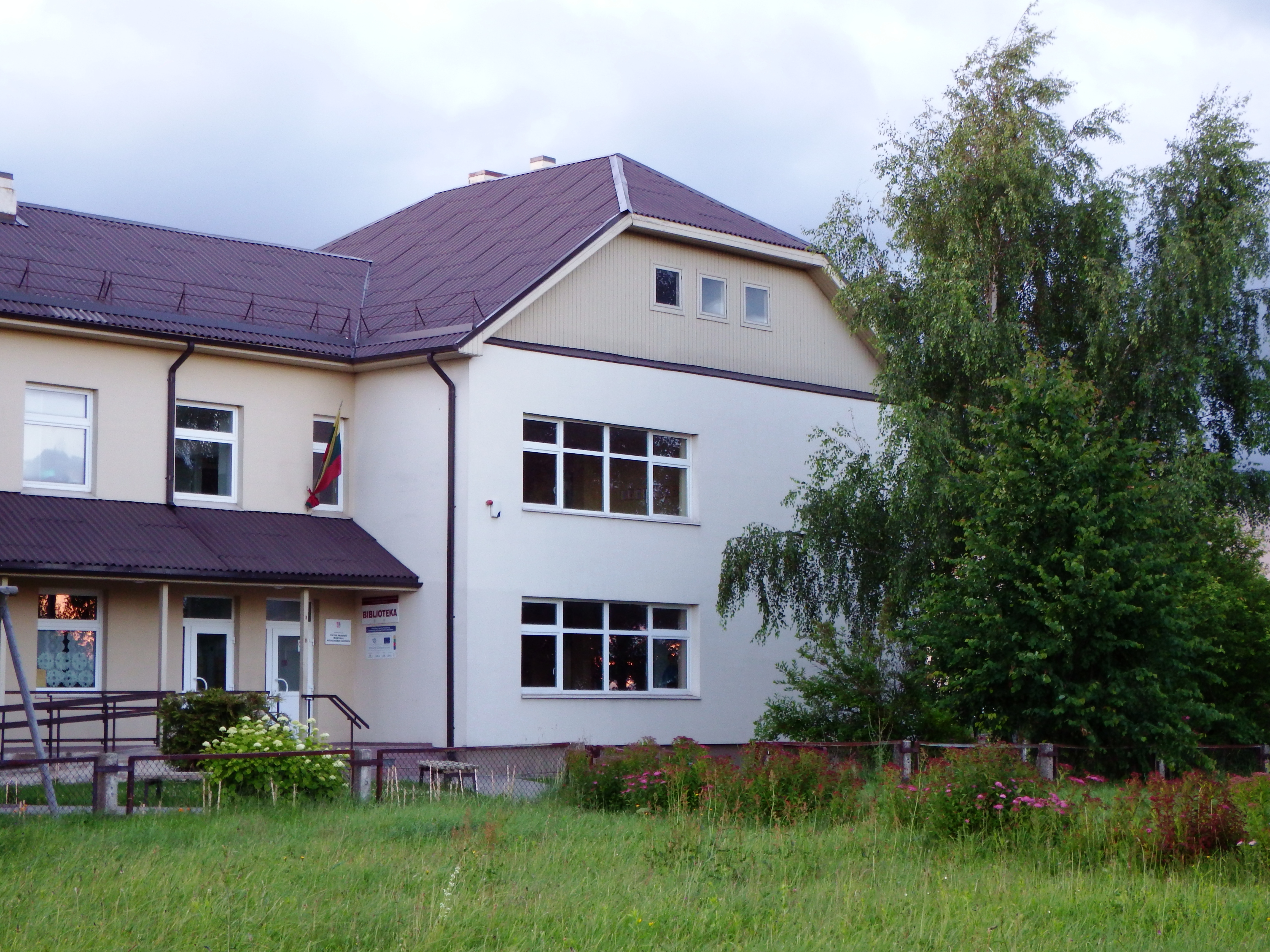 Pakalniškių biblioteka, Elektrėnų sav.